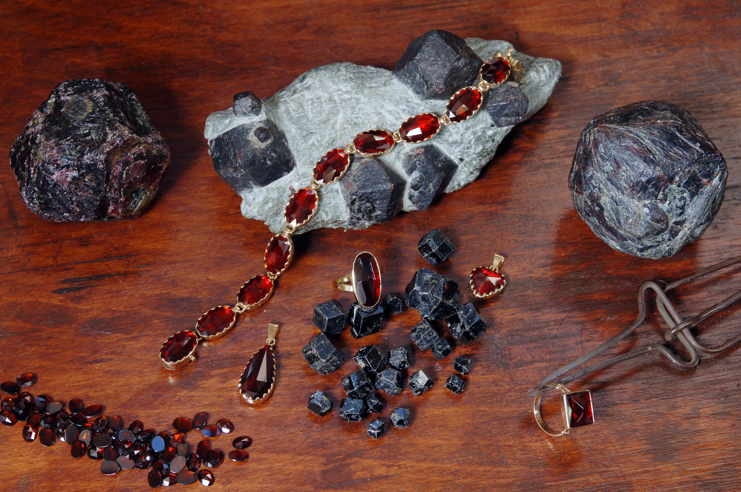 Unique et précieux, Le grenat de Perpignan est la pierre mythique des Catalans, montée sur or, elle représente les couleurs catalanes.